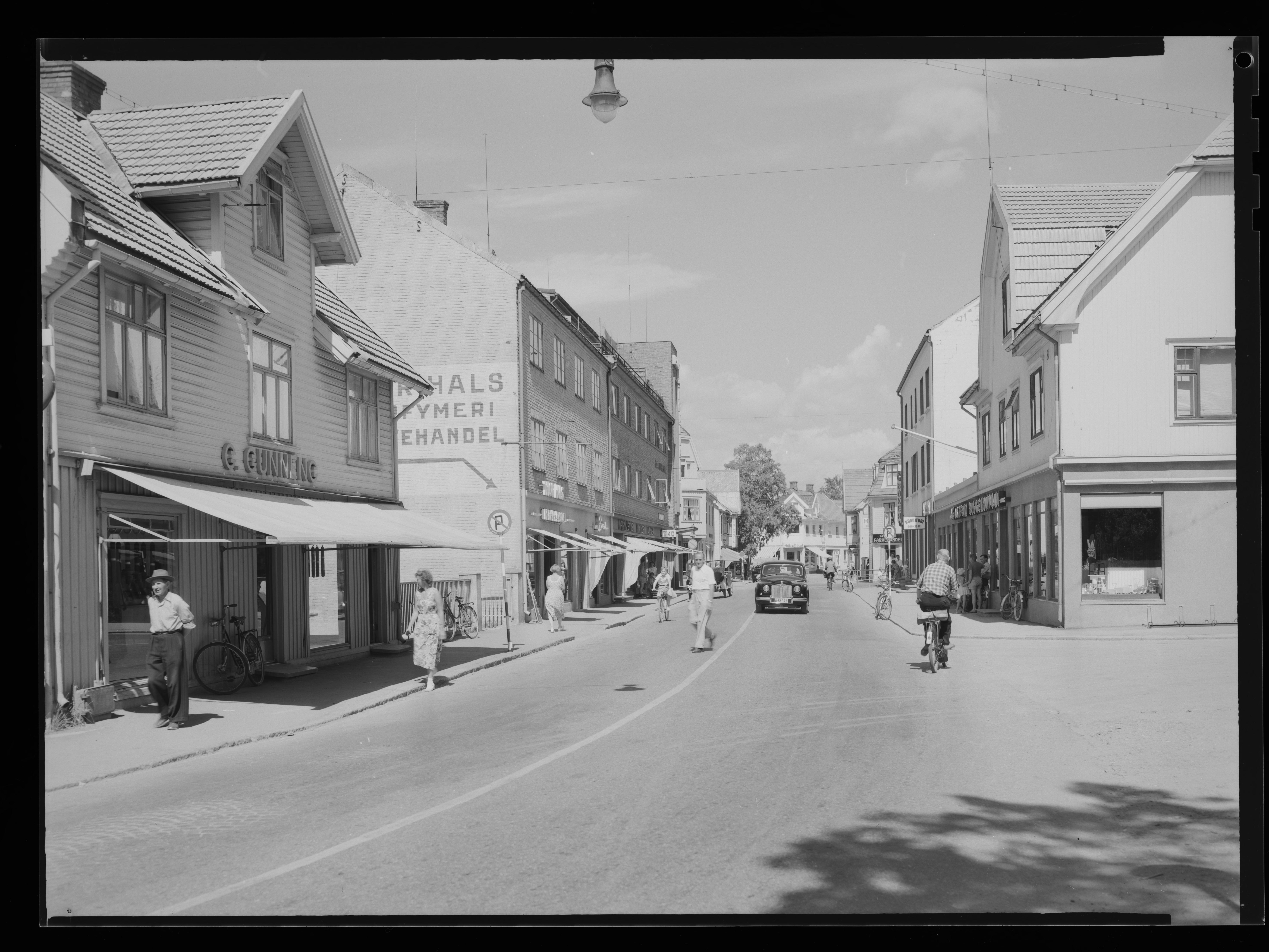 Bildet er hentet fra Nasjonalbibliotekets bildesamling Askim, Askim, Østfold